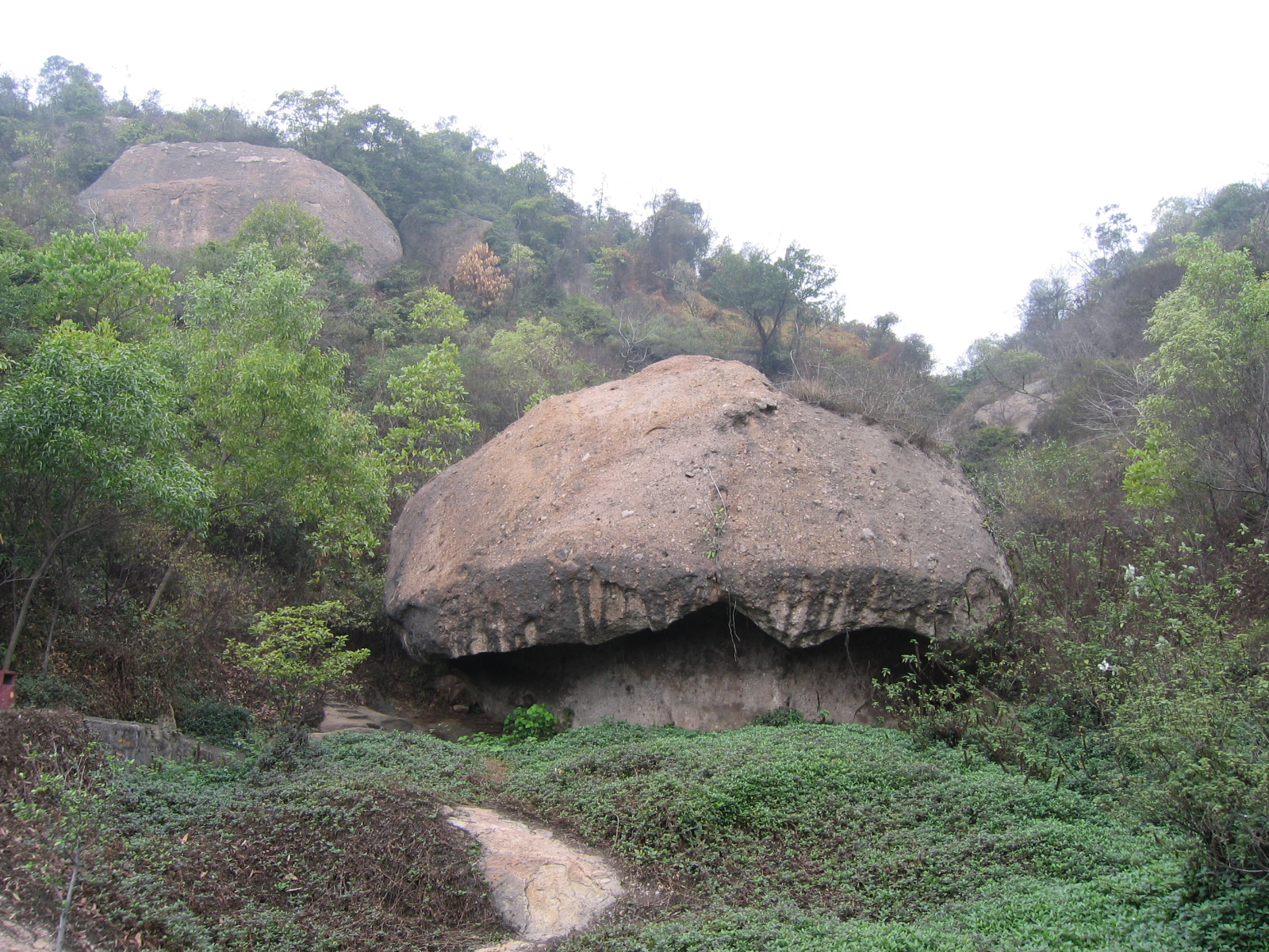 西樵山蘑菇石 Xiqiao Mountain, Foshan, Guangdong, China